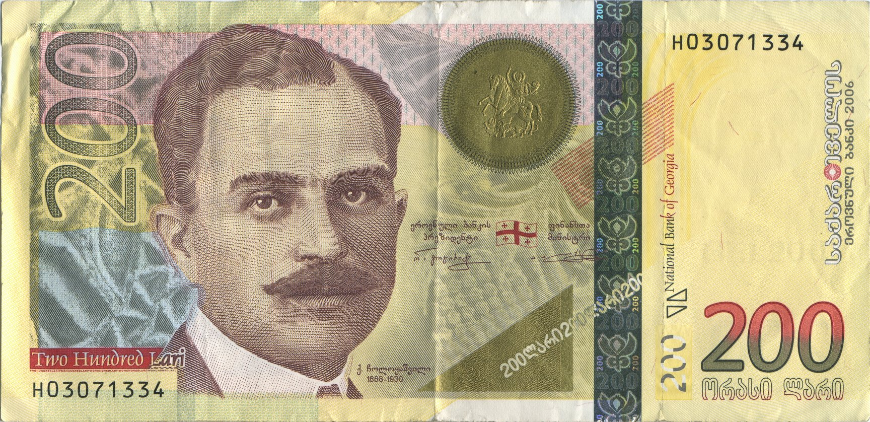 200 Georgian lari